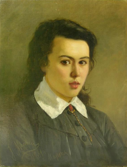 Портрет Анны Константиновны Чертковой (1859-1927). 1881 г. Материал, техника: холст, масло Размер: 49,0 х 38,0 см Номер в Госкаталоге: 4352868 Номер по ГИК (КП): КП-1626 Инвентарный номер: Ж-195 (Федеральное государственное бюджетное учреждение культуры "Государственный мемориальный и природный заповедник "Музей-усадьба Л.Н. Толстого "Ясная Поляна")